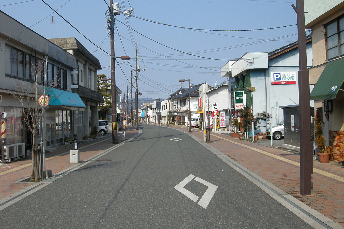 庄原市中本町 Nakahonmachi Shobara city